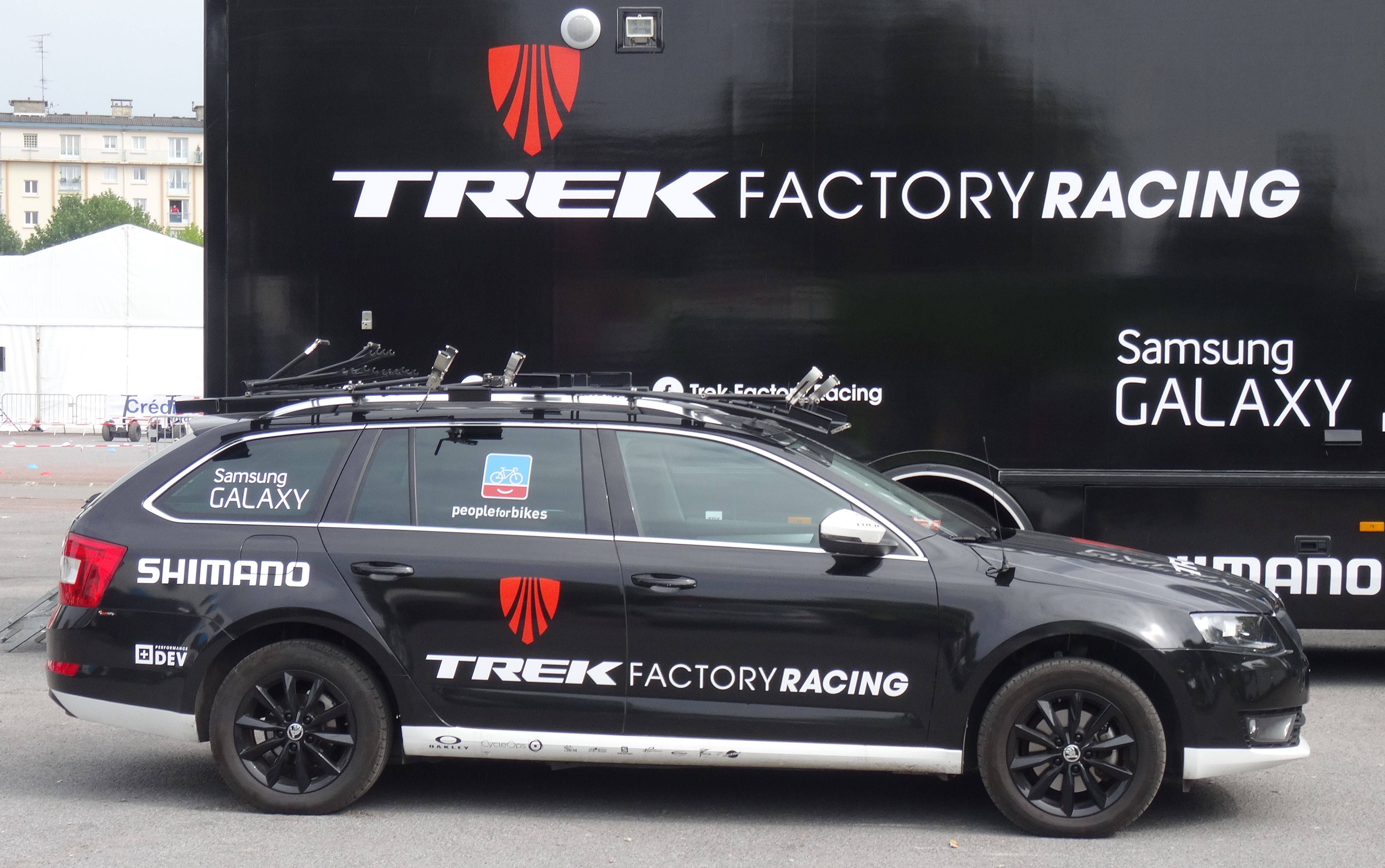 Reportage photographique réalisé le dimanche 7 septembre à l'occasion du départ et de l'arrivée du Grand Prix de Fourmies 2014 à Fourmies, Nord-Pas-de-Calais, France.